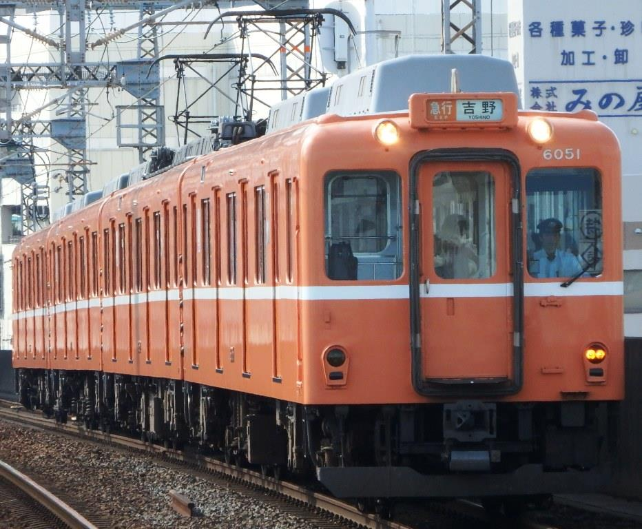 6020系 ラビットカー復刻塗装